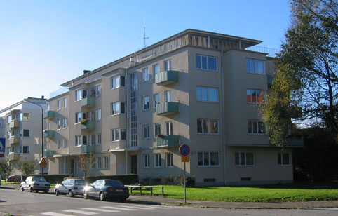 Bostadshus Ribersborg Malmö arkitekt T Moller 1938